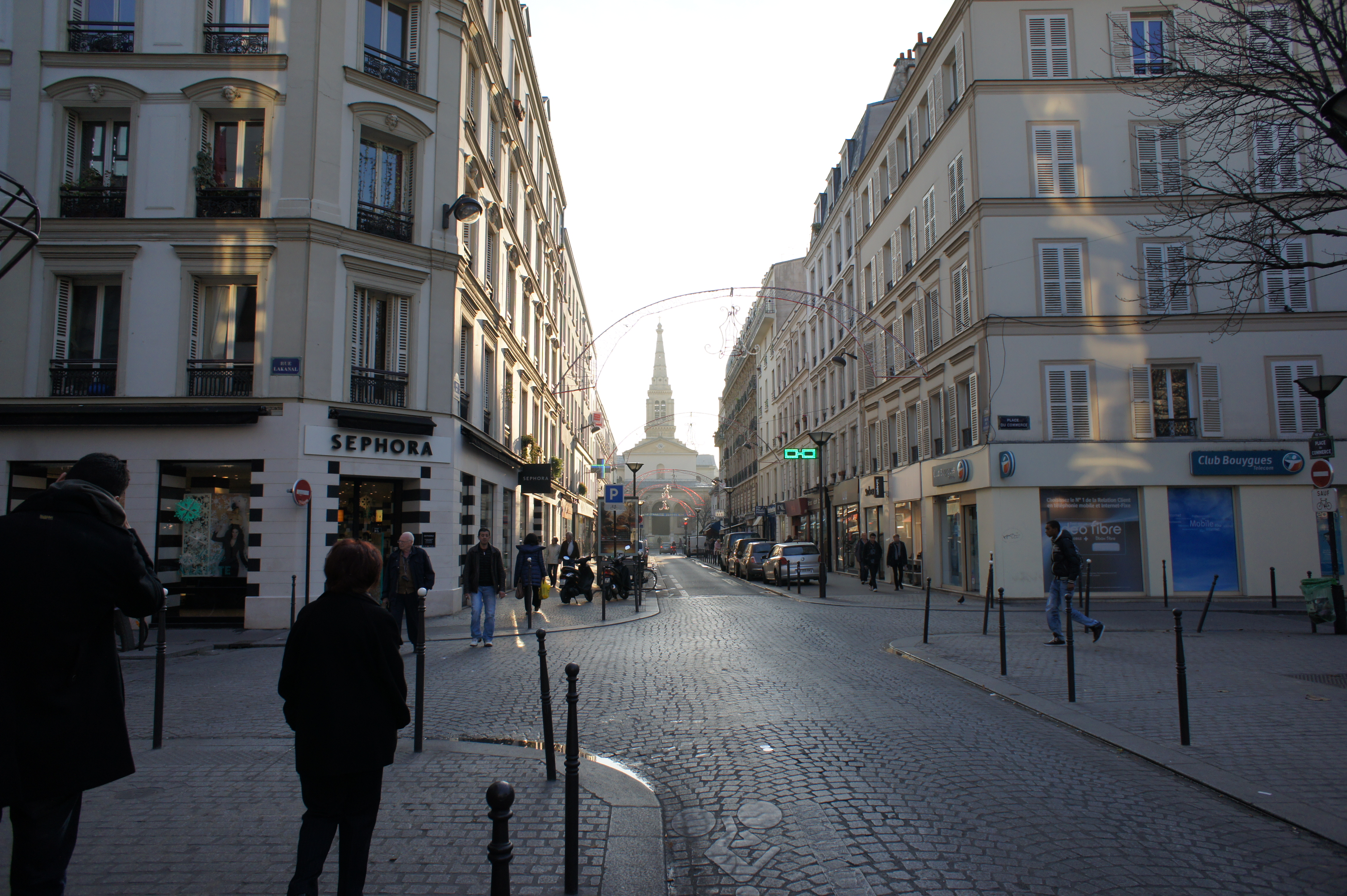 avant Noël